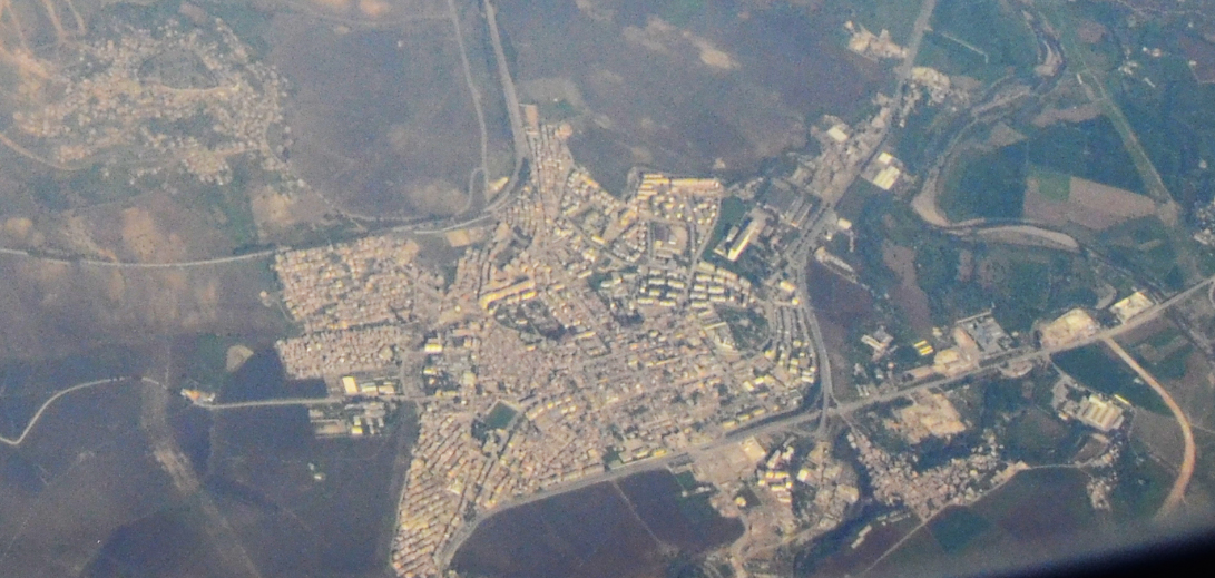 Vue aerienne d'El Harrouch